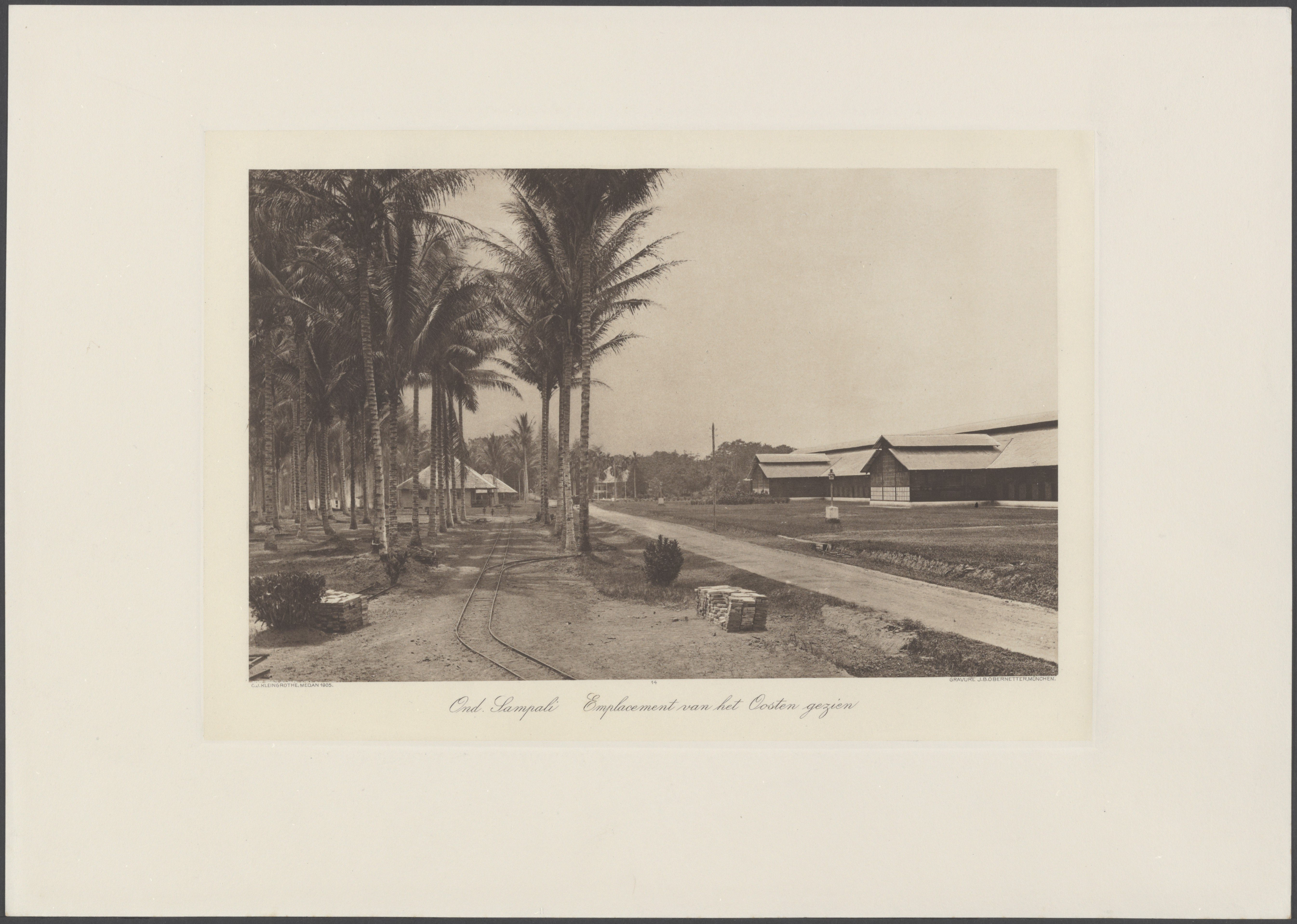 Collectie / Archief : Fotocollectie Deli Maatschappij Reportage / Serie : Fotoalbum Deli Maatschappij: "Deli Maatschappij. Oost Kust van Sumatra" (C.J. Kleingrothe, Medan) Beschrijving : Onderneming Sampali. Emplacement van het Oosten gezien Datum : 1905 Locatie : Indonesië, Nederlands-Indië, Sumatra Fotograaf : Kleingrothe, Carl. J. Auteursrechthebbende : Materiaalsoort : Albumpagina, Foto (zwart/wit) Nummer archiefinventaris : bekijk toegang 2.20.46 Inventarisnummer : 853 Bestanddeelnummer : 853_21